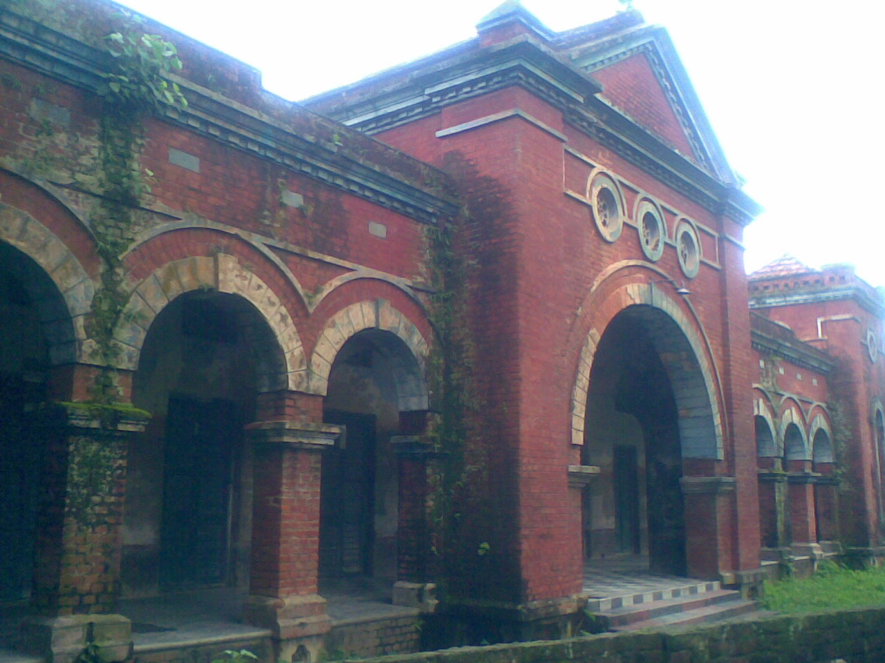 নওগাঁর অফিস ভবন Description নওগাঁর অফিস ভবন Date13 August 2008SourceOwn work by the original uploaderAuthorKazi S. M. Faysal(Naogaon) নওগাঁর অফিস ভবন